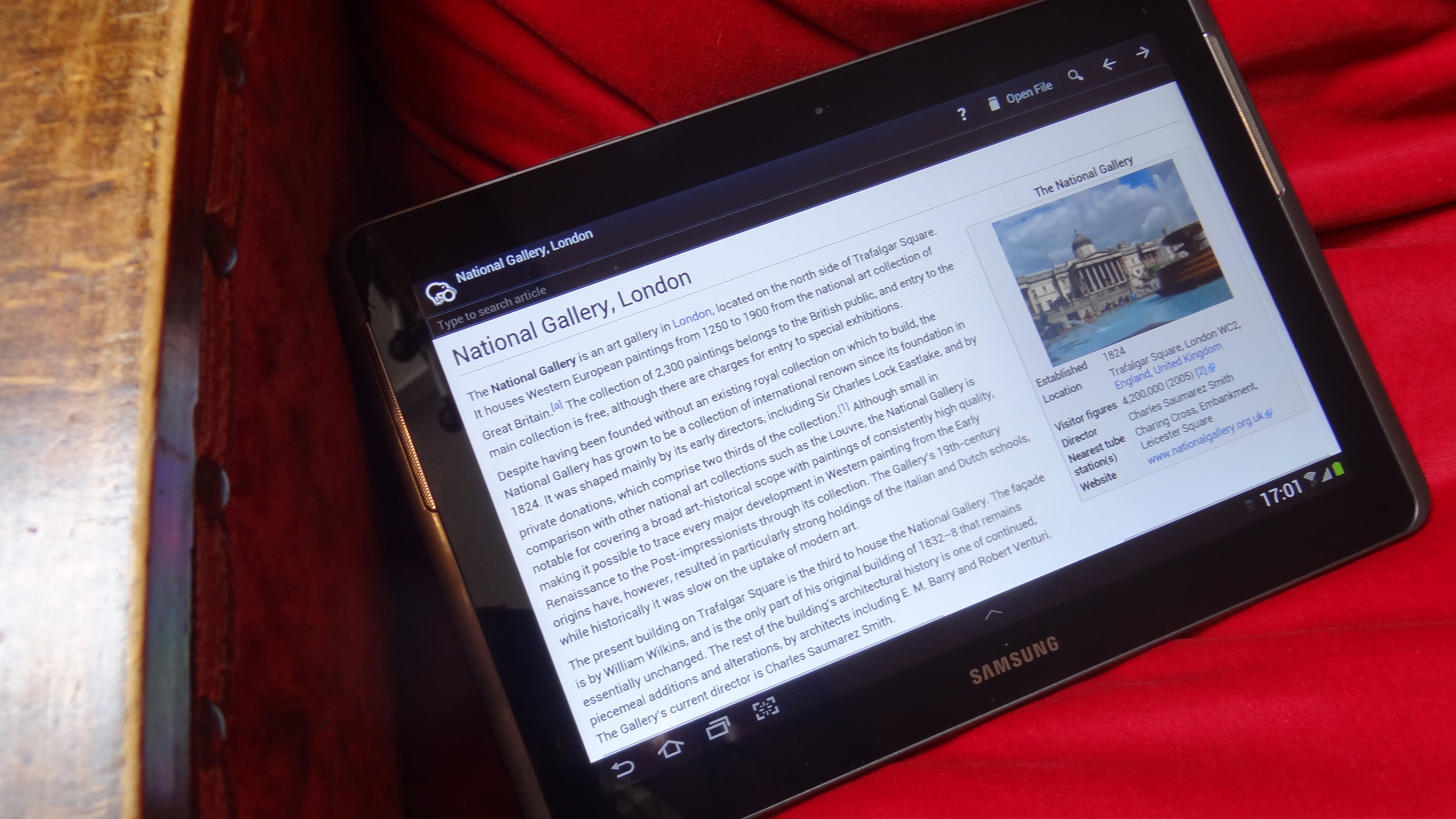 Kiwix sur une tablette Android